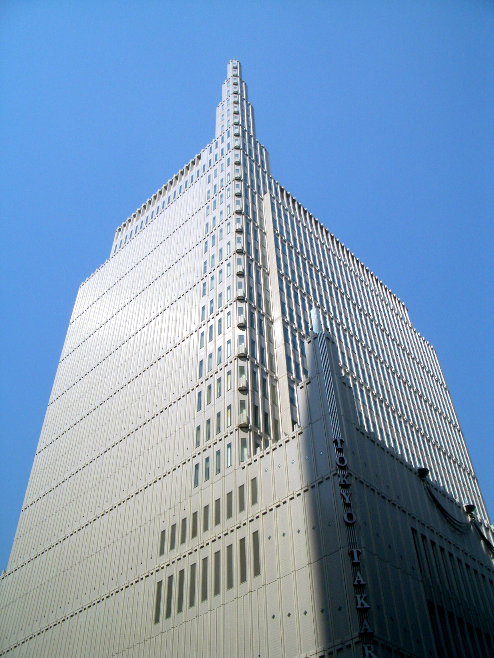 Tokyo Takarazuka Building,1-1-3 Yurakucho, Chiyoda-ku, Tokyo, Japan.